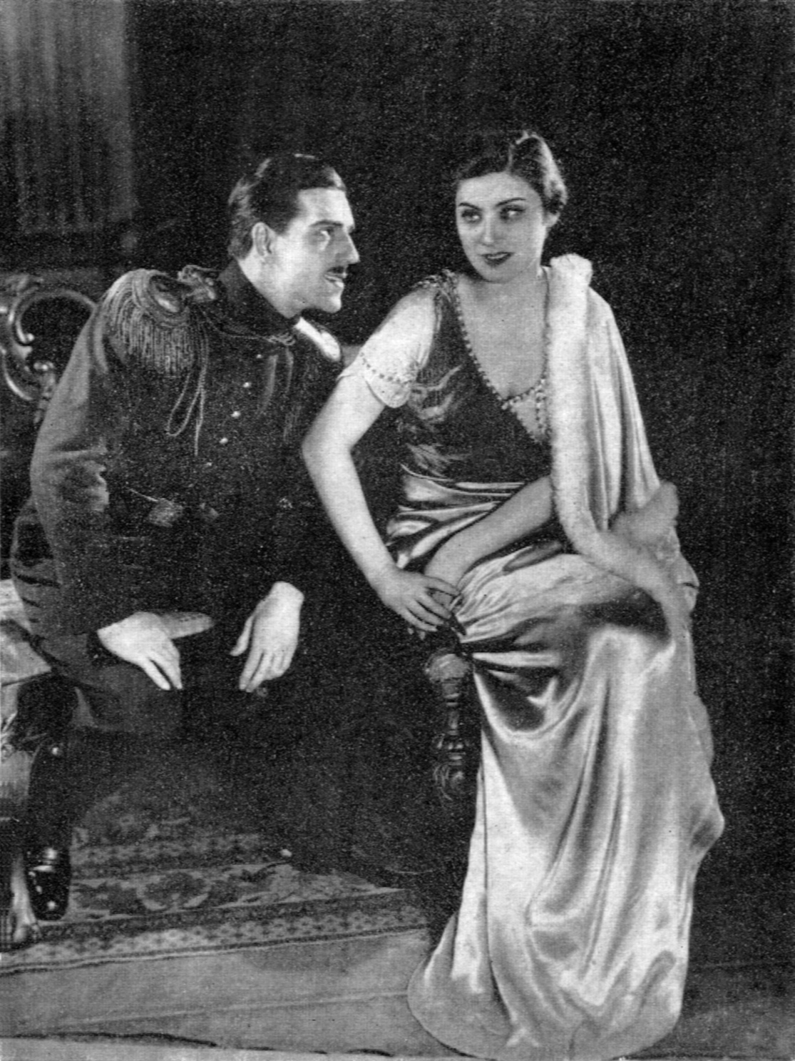 Irena Eichlerówna (Anna Maria Lesser) i Mieczysław Milecki (Porucznik Austin) w sztuce Jerzego Tepy "Fräulein Doktor" - premiera 31 marca 1933